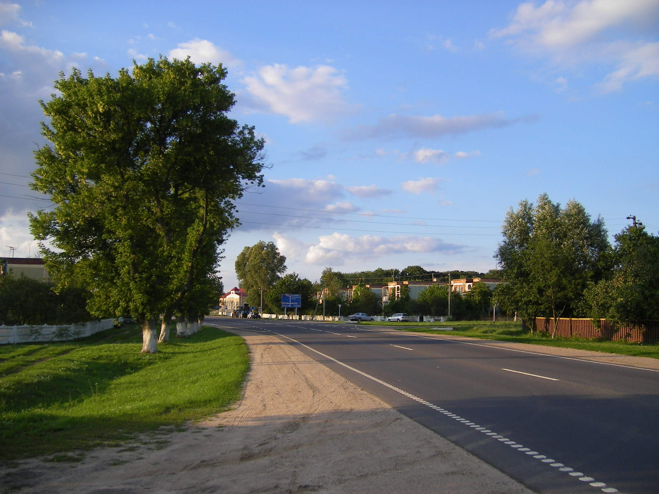 Vidomlya, Kamyanets district